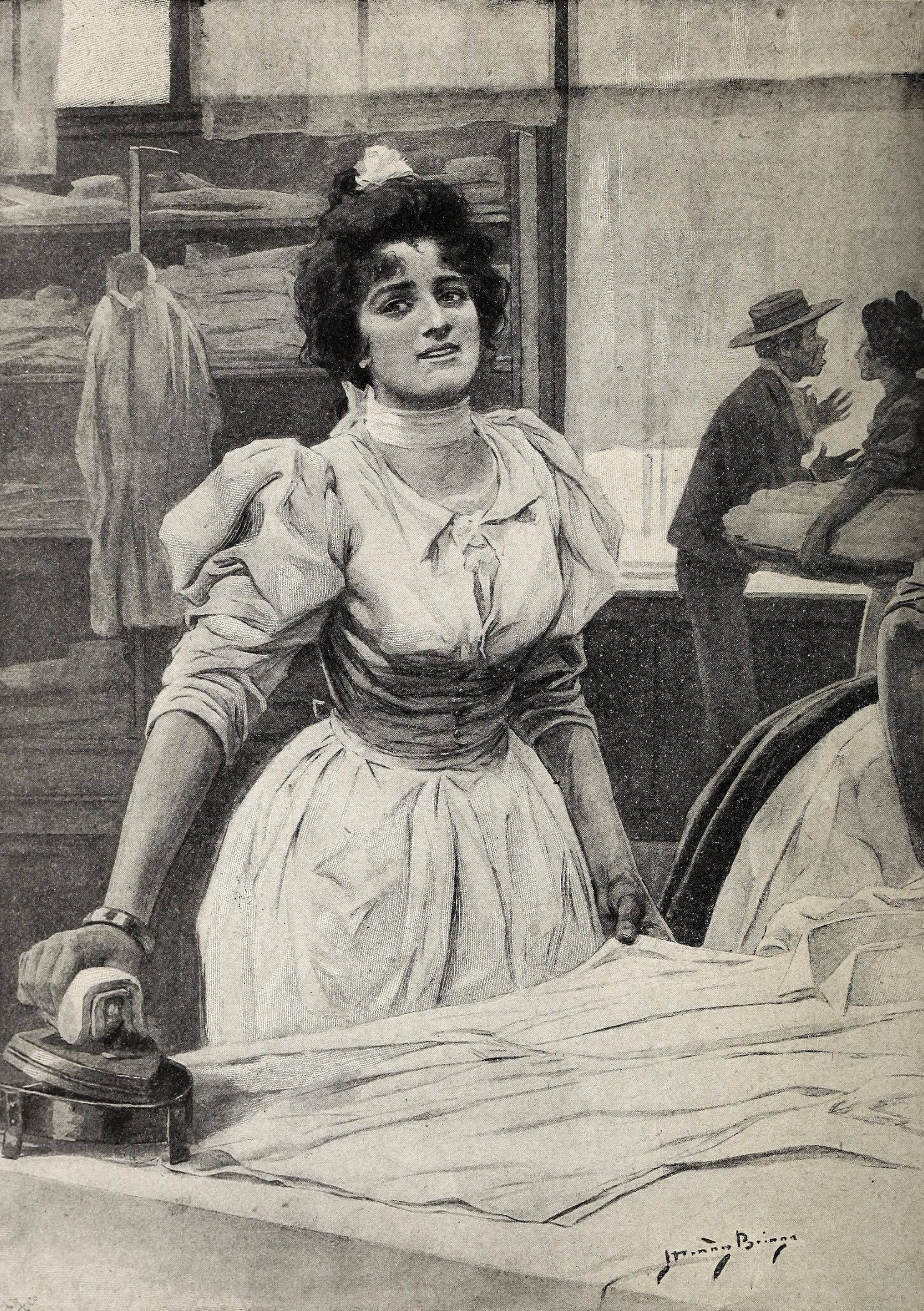 La Mujer Madrileña. Planchadora, de Méndez Bringa.